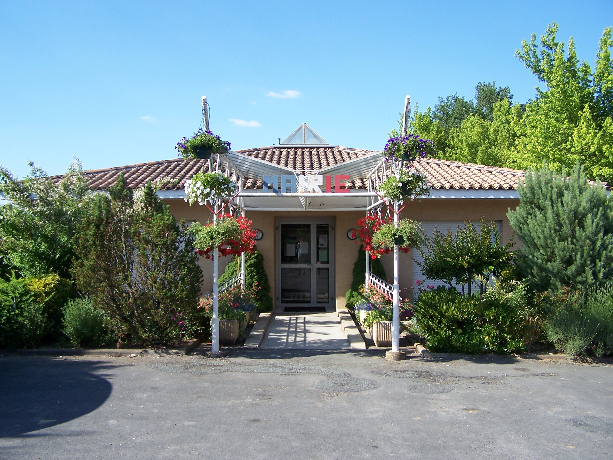 Mairie de Fontet, Gironde, France